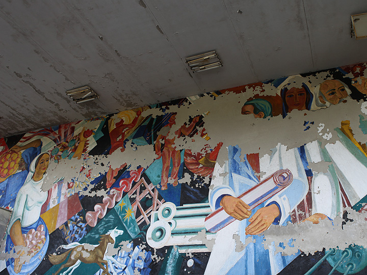 Propaganda mural paints.